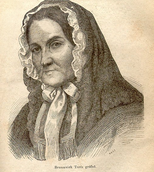 Brunszvik Teréz (korompai gróf), (eredetileg Brunswick) (Pozsony, 1775. július 27. – Pest, 1861. szeptember 23.) az első magyarországi óvodák megalapítója. Rusz Károly metszete.